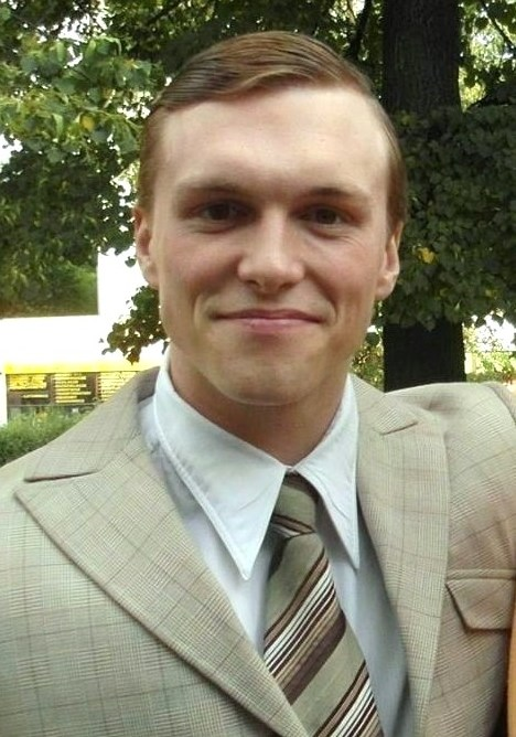 Aktor Tomasz Włosok jako Jerzy Roland na planie serialu "Bodo".